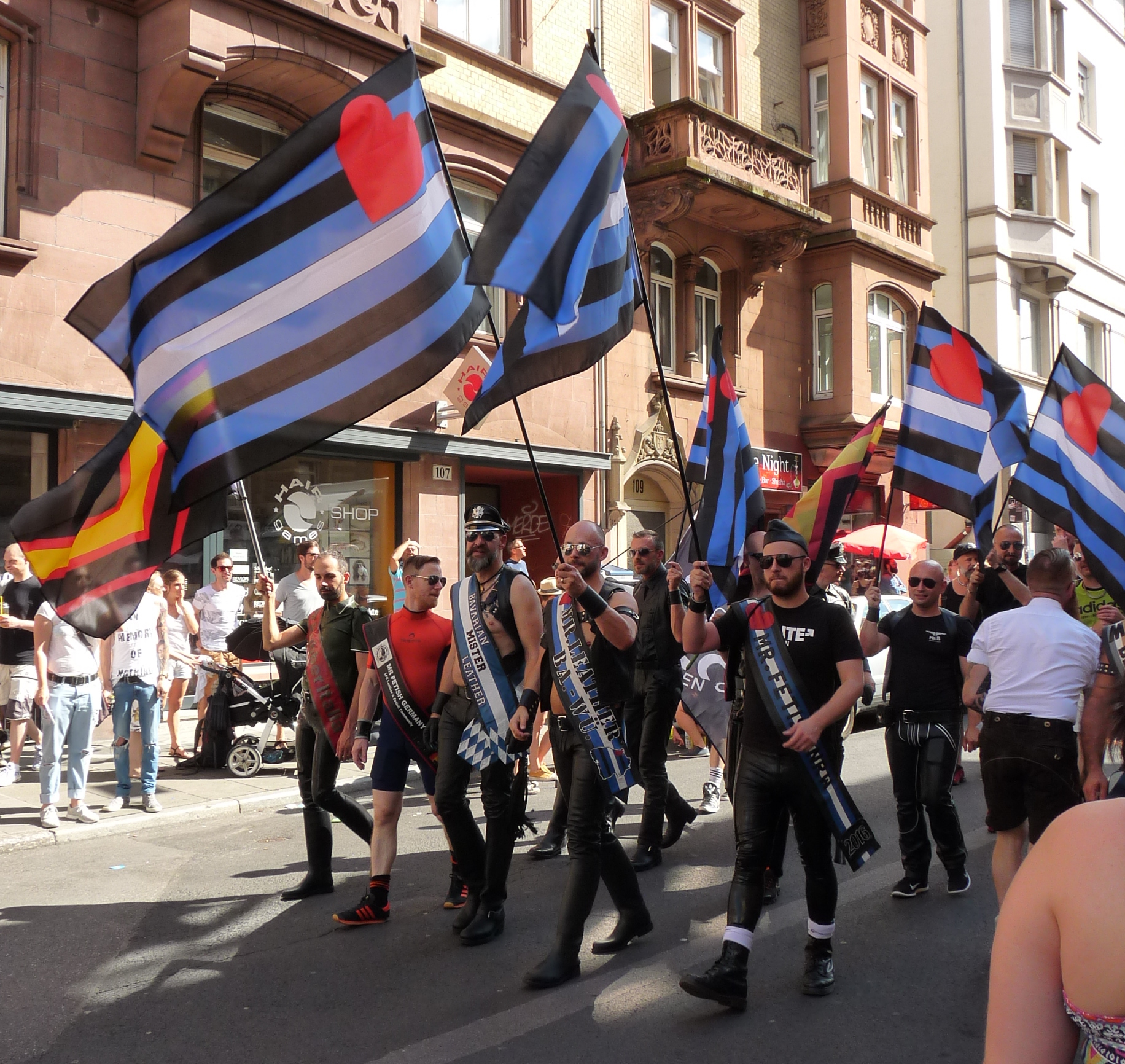 Stuttgart - CSD 2016 - Parade - Lederclub Stuttgart e.V. Mr. Bear Italia / Mr. Fetish Germany / Bavarian Mr. Leather / Mr. Leather Baden Württember / Mr. Fetish Nordrein Westfalen